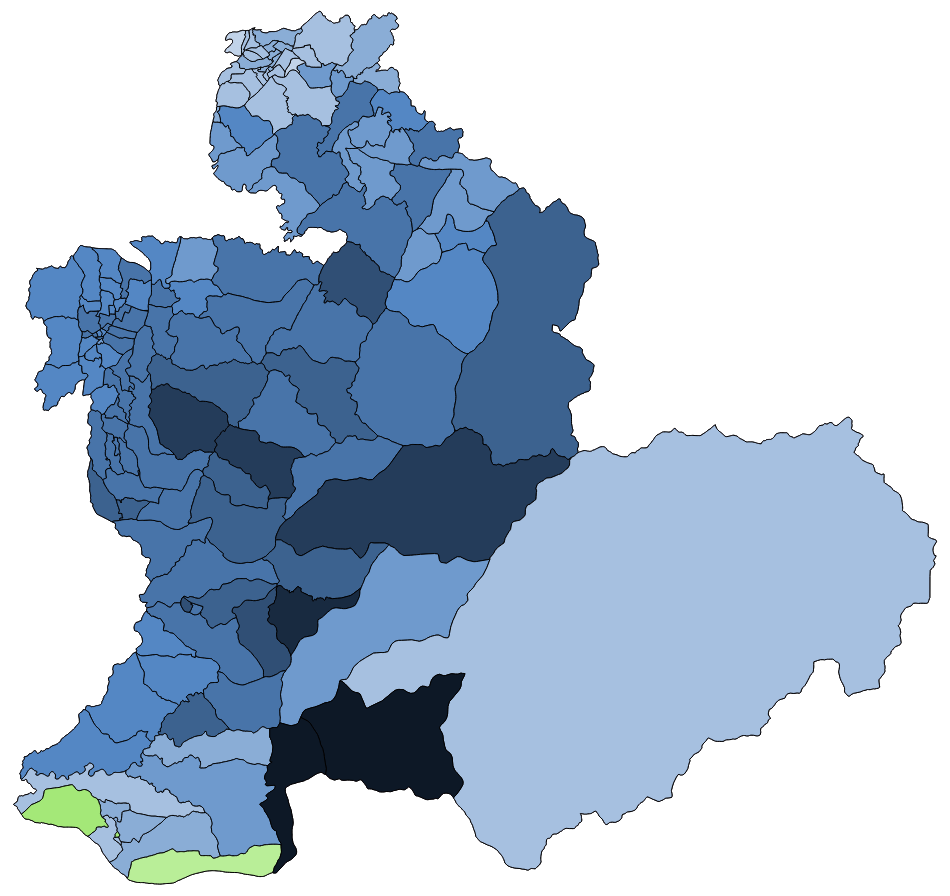 中文（台灣）: 顏色對照表 部分村里因共用投開票所 故圖中部分村里得票為依人口調整後資料